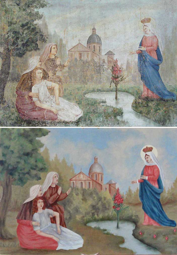 Pintura mural com cena de cura milagrosa por intervenção da Virgem de Caravaggio. Capela-mor da antiga Matriz de Caravaggio, Farroupilha, Brasil. Antes e depois do restauro desastroso